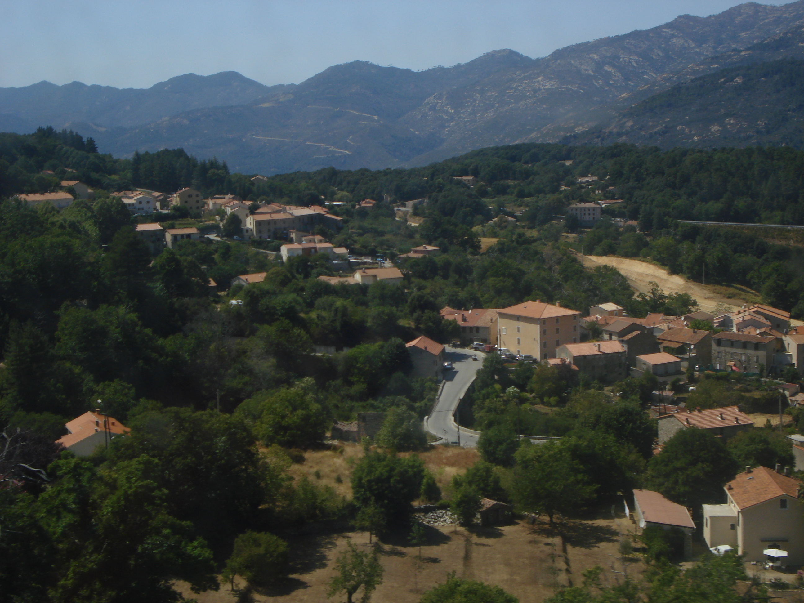 Vue de Bocognano